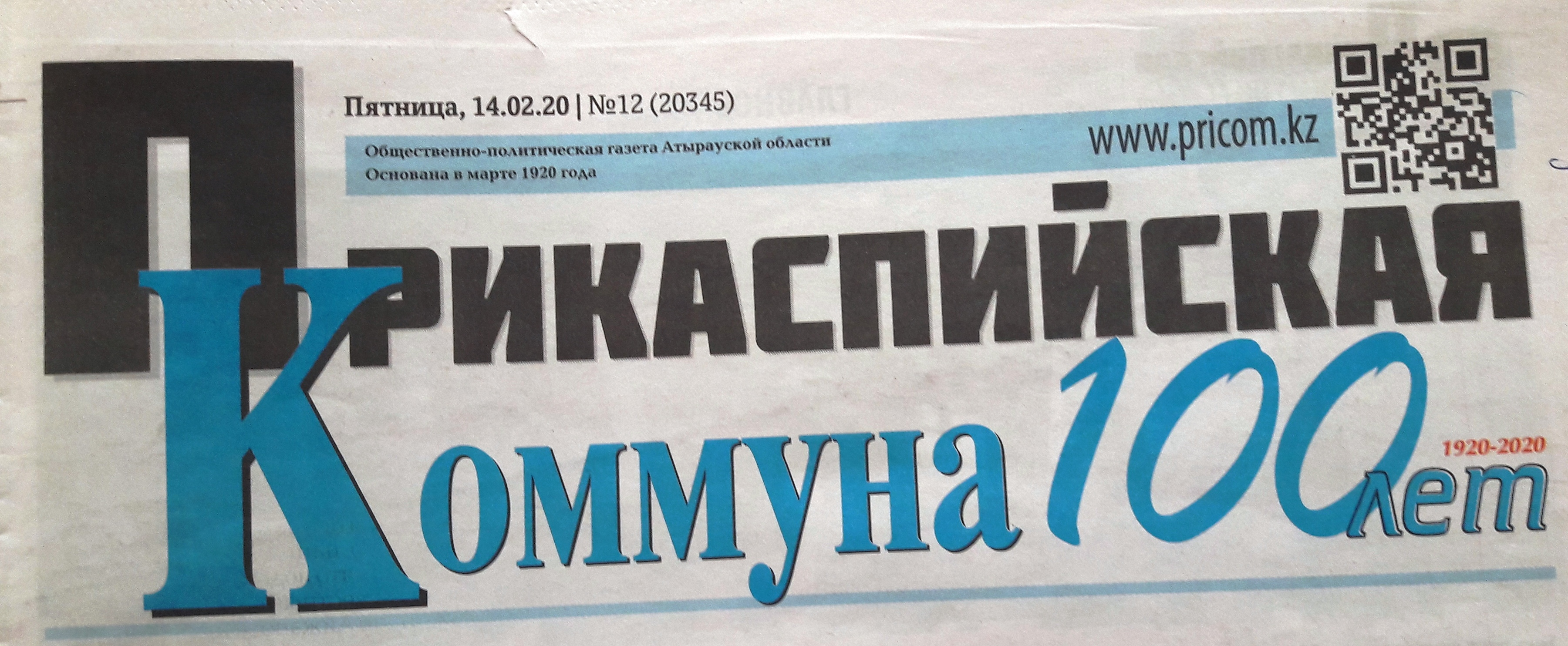 Қазақша (кирил): Газета